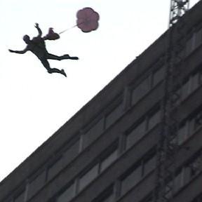 Saut en Base Jump depuis un immeuble d'habitation. 80 mètres de hauteur, ouverture immédiate. Source Photographie extraite d'une vidéo personnelle. Prise au printemps 2006 à Paris.